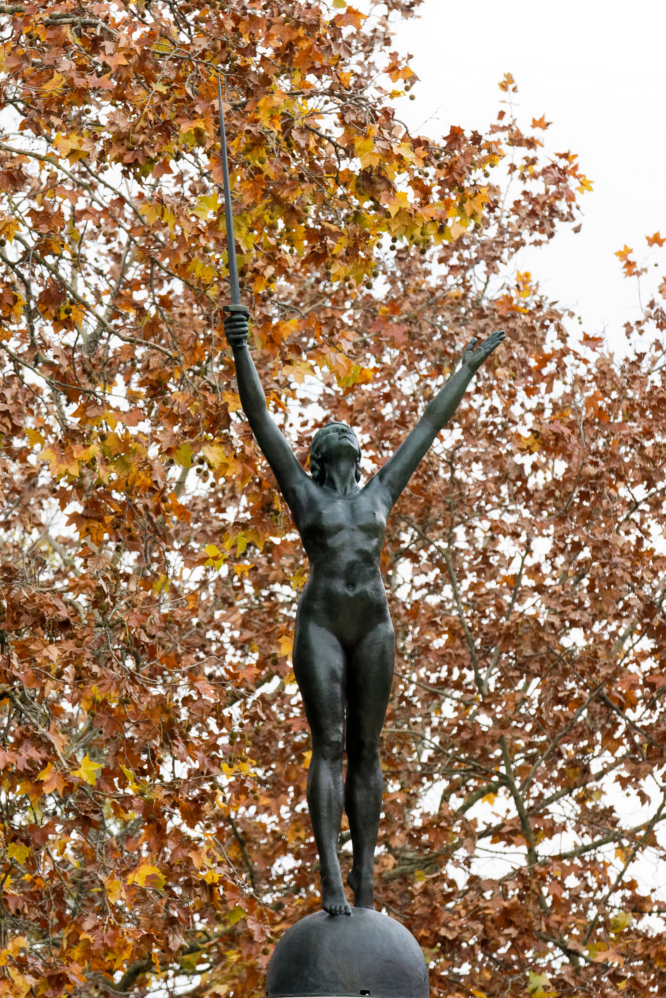 La Délivrance, sculpture d'Émile Oscar Guillaume, Square du Maquis-de-Saffré (Nantes, Loire-Atlantique, Pays de la Loire, France)